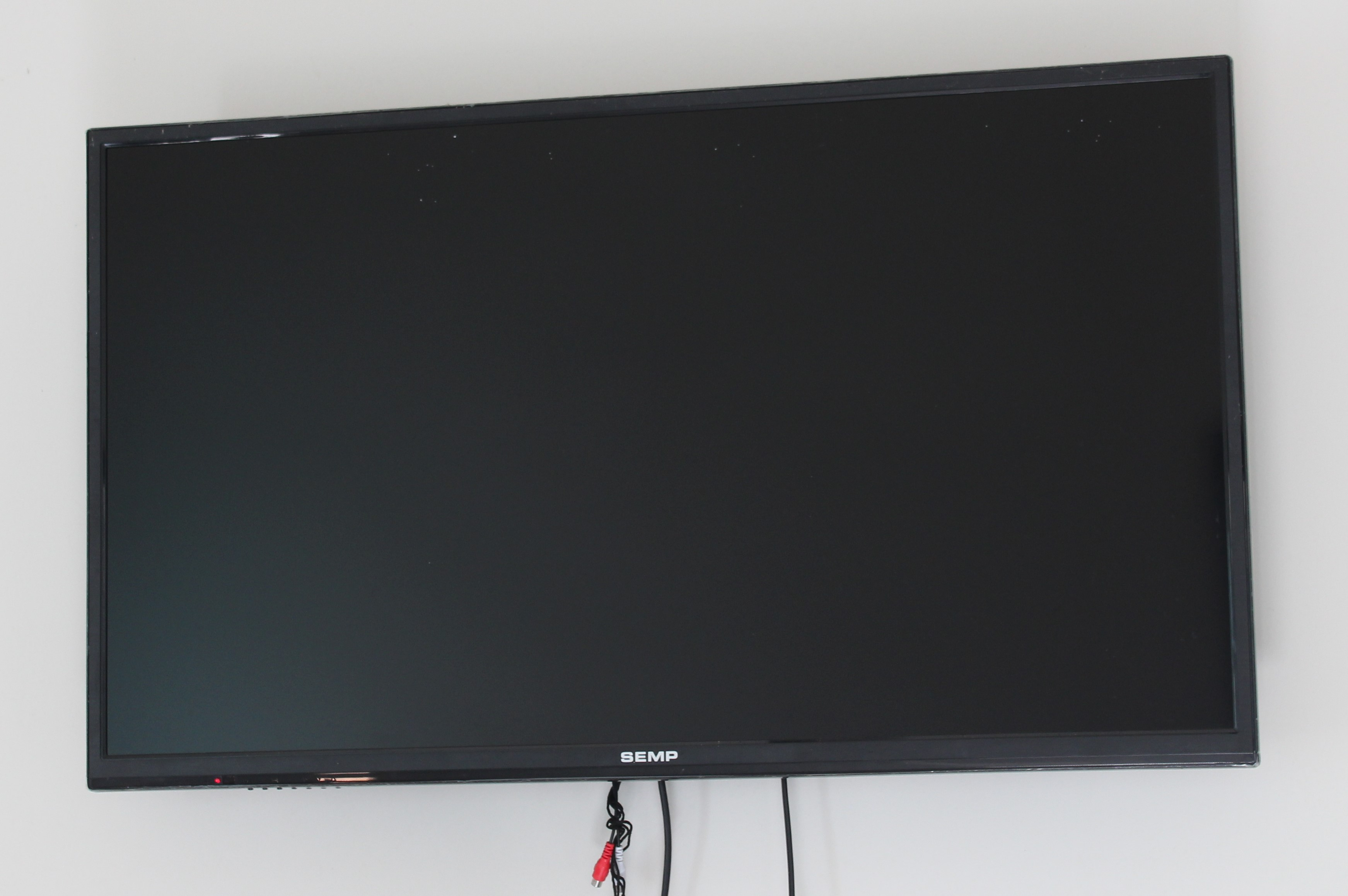 Tela para tv ou computador da SEMP